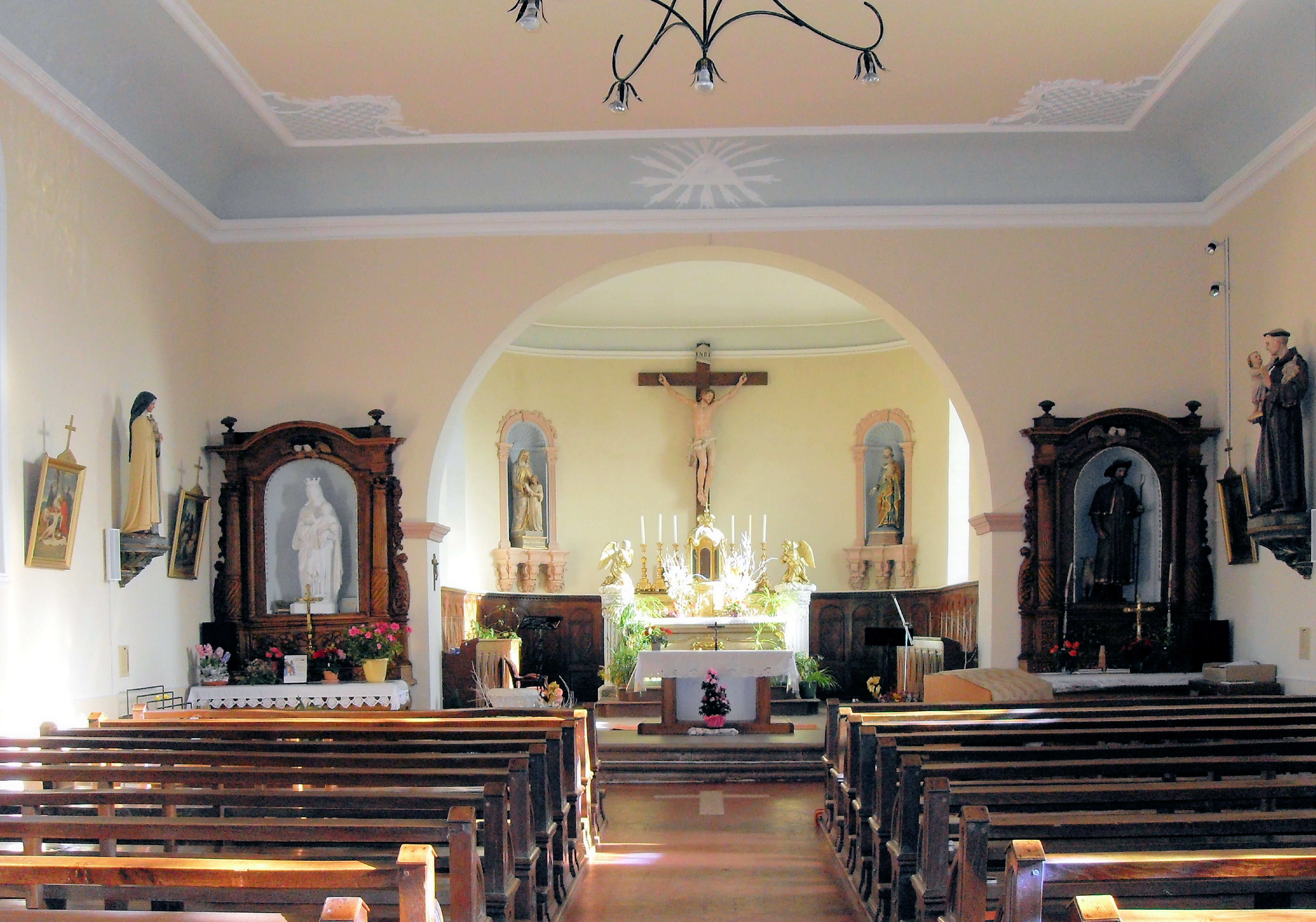 L'intérieru d'église Saint-Vendelin d'Anjoutey